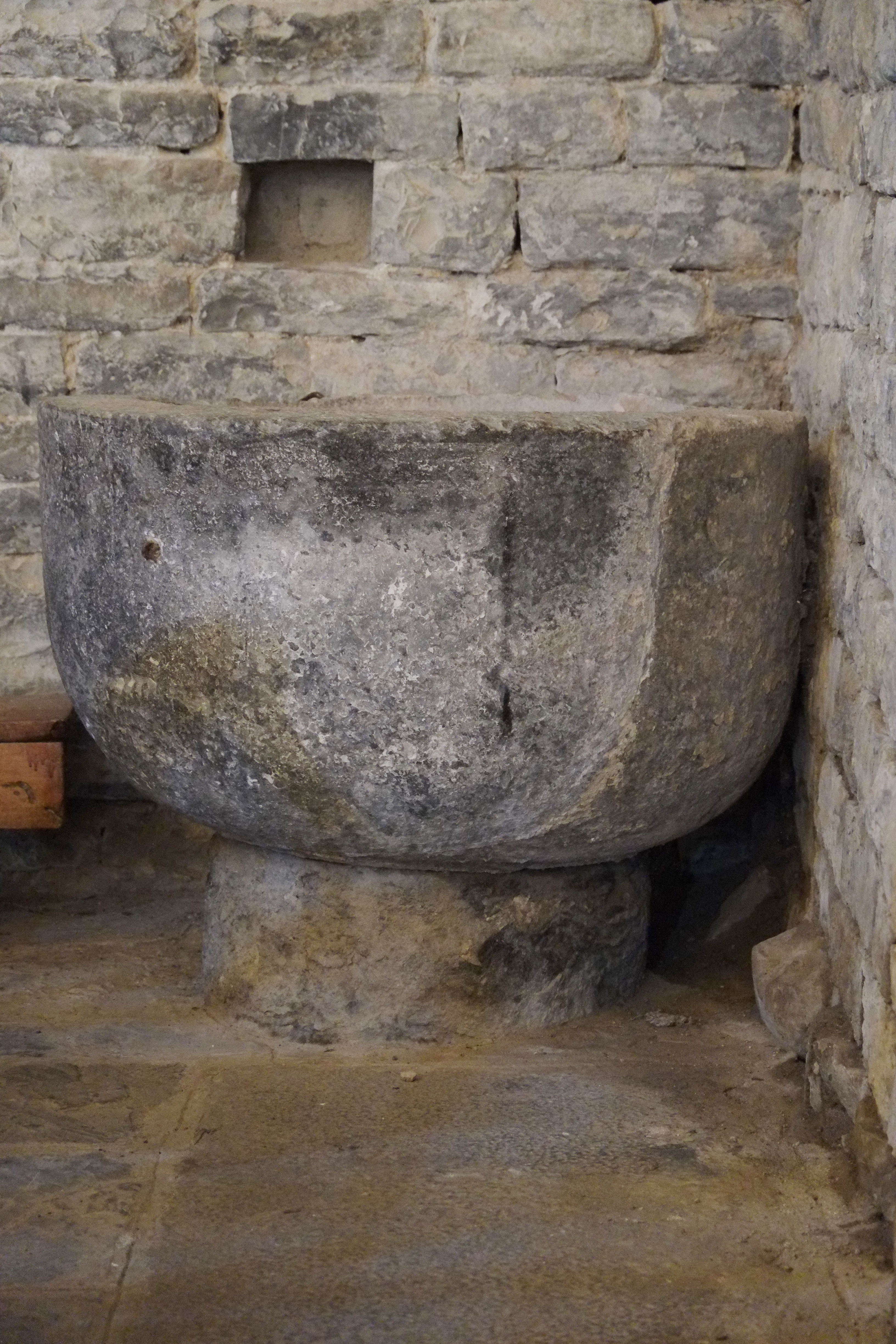 Taufstein in der Kirche San Martín in Oliván in der Provinz Huesca in Aragonien (Spanien)